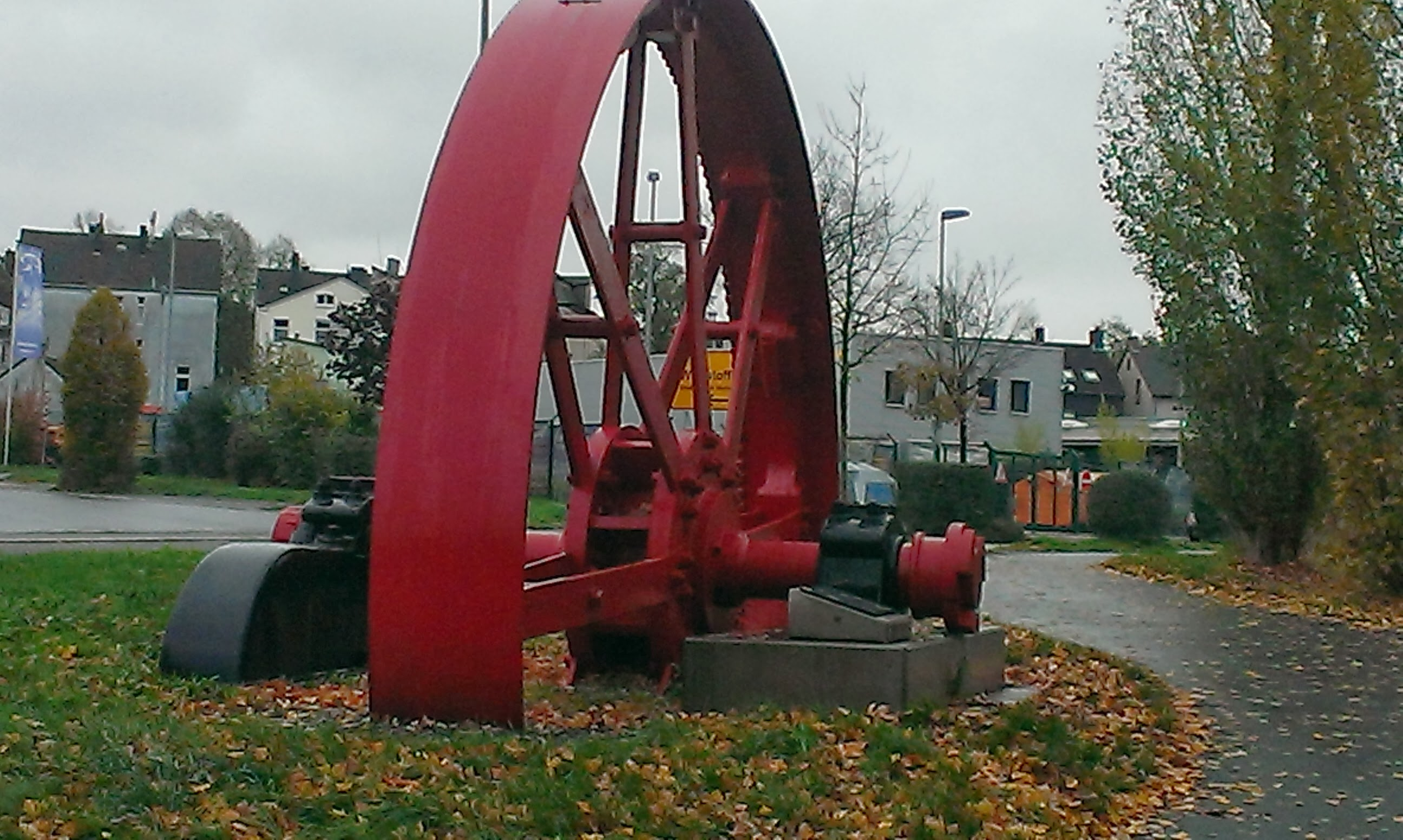 Dampfmaschinenschwungrad im Schöntal, Wetter (Ruhr)